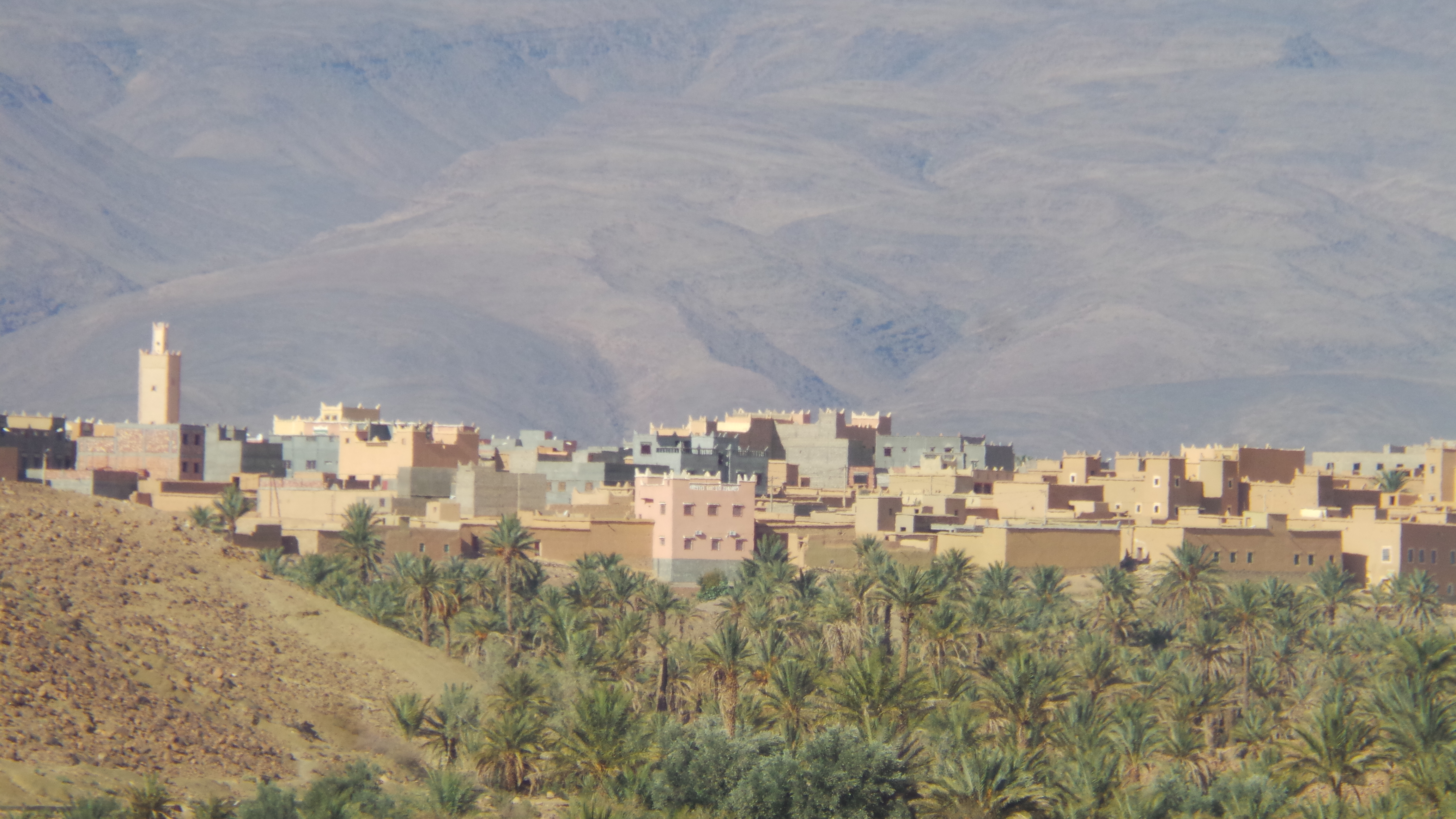 le village Nkob situé sur la colline au sud est des reliefs Saghro